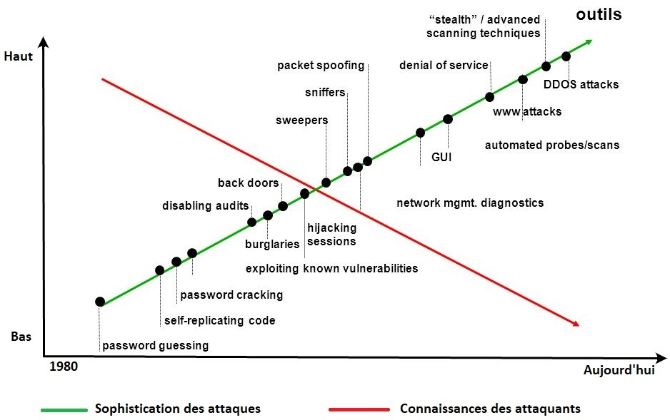 Connaissance des attaquants